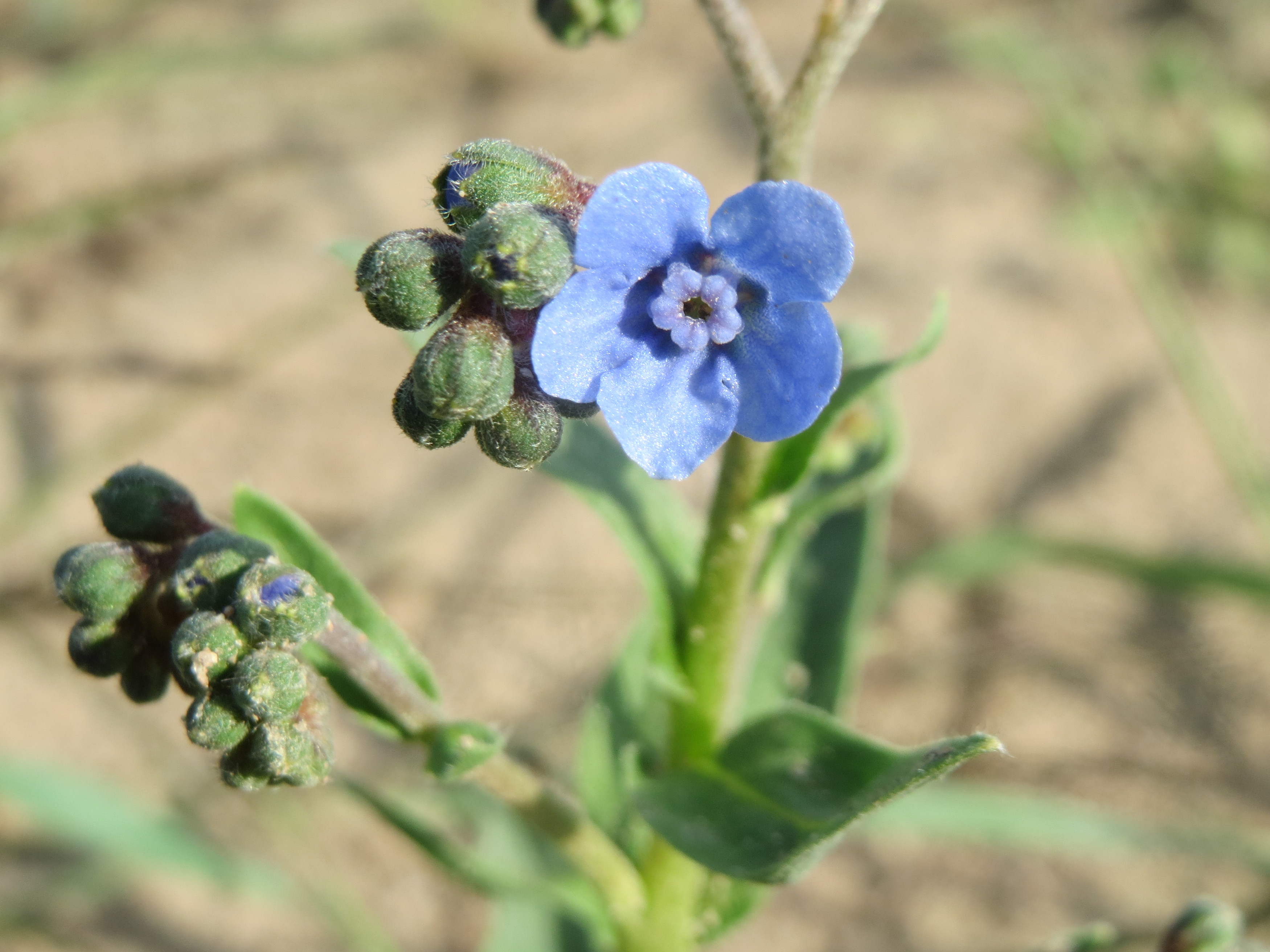 Ausgewildertee China-Hundszunge (Cynoglossum amabile) in Hockenheim